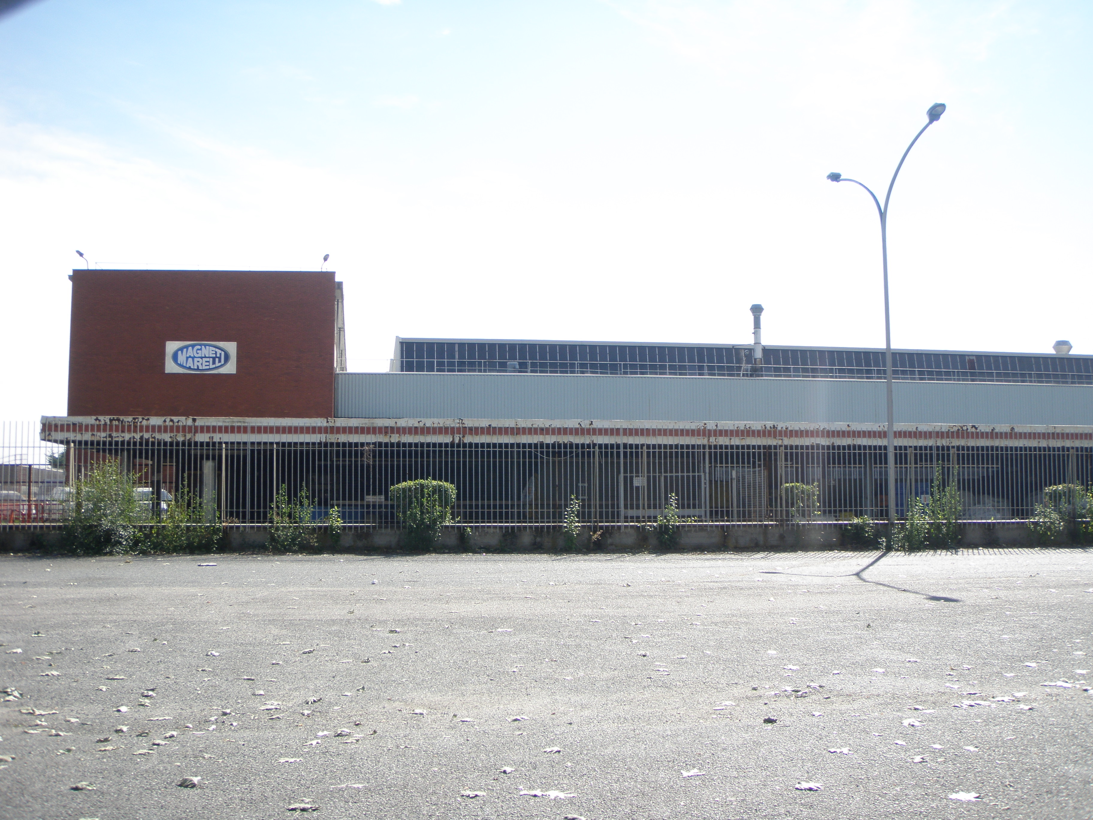 Magneti Marelli S.p.A., Orbassano